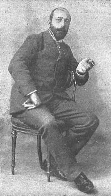 Retrato de Alejandro Saint-Aubin por Manuel Compañy y recogido en la revista española Nuevo Mundo.